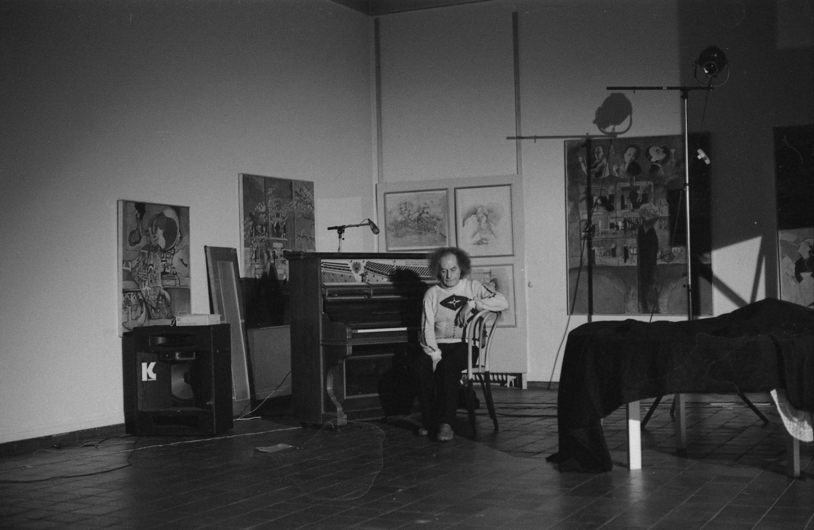 Sven-Eric Johanson fotograferad vid festivalen Framförande på Göteborgs Konsthall 1980 av CM von Hausswolff.